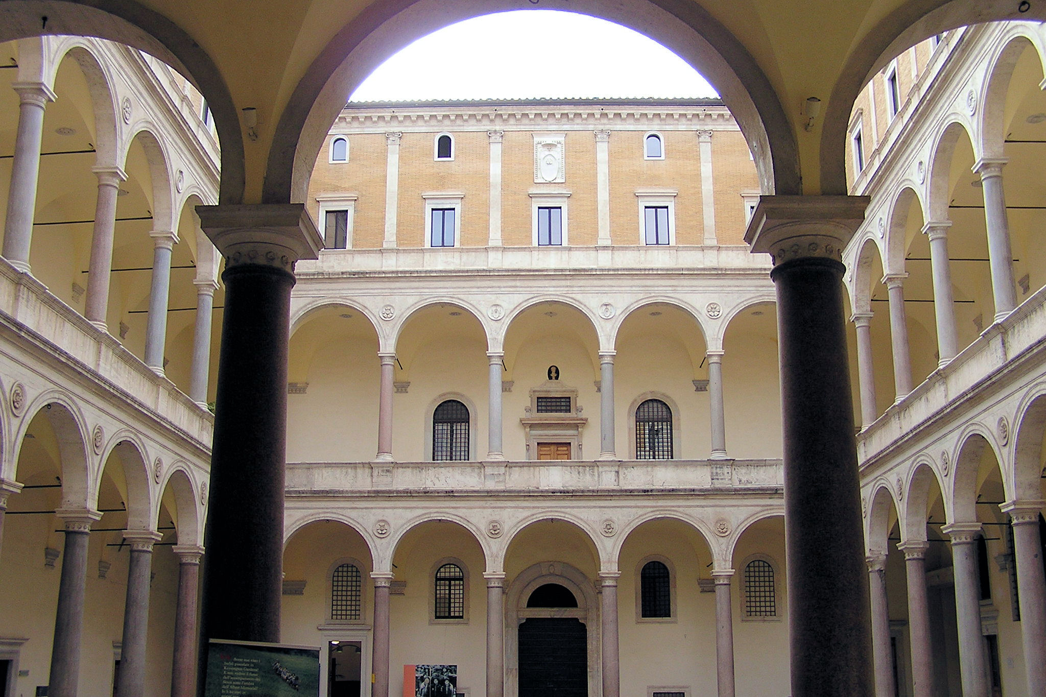 cour intérieur du palais de la chancellerie à Rome